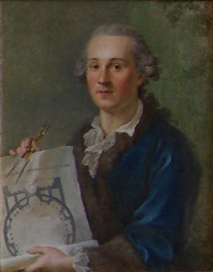 Porträt des Baumeisters Christian Ludwig Hautt (1726-1806)